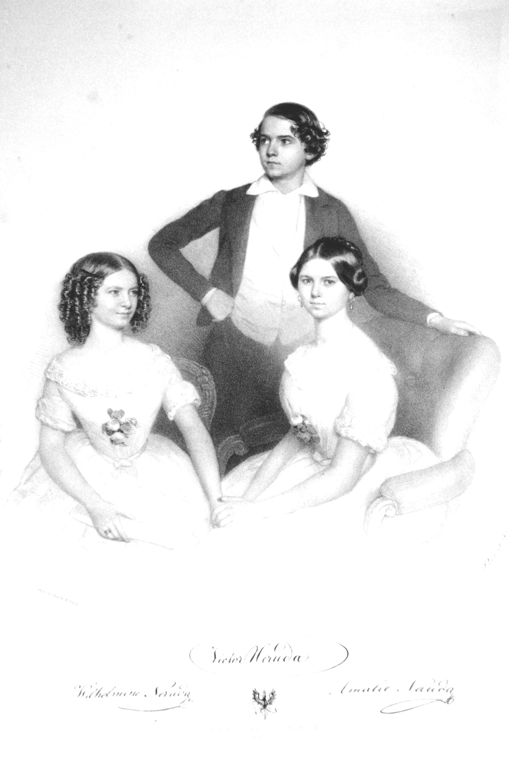 Geschwister Neruda: Wilhelmine (1839-1911) Geigerin; Maria (1834- ?) Geigerin; Viktor (1852- ?) Pianist. Lithographie von August Prinzhofer, 1850